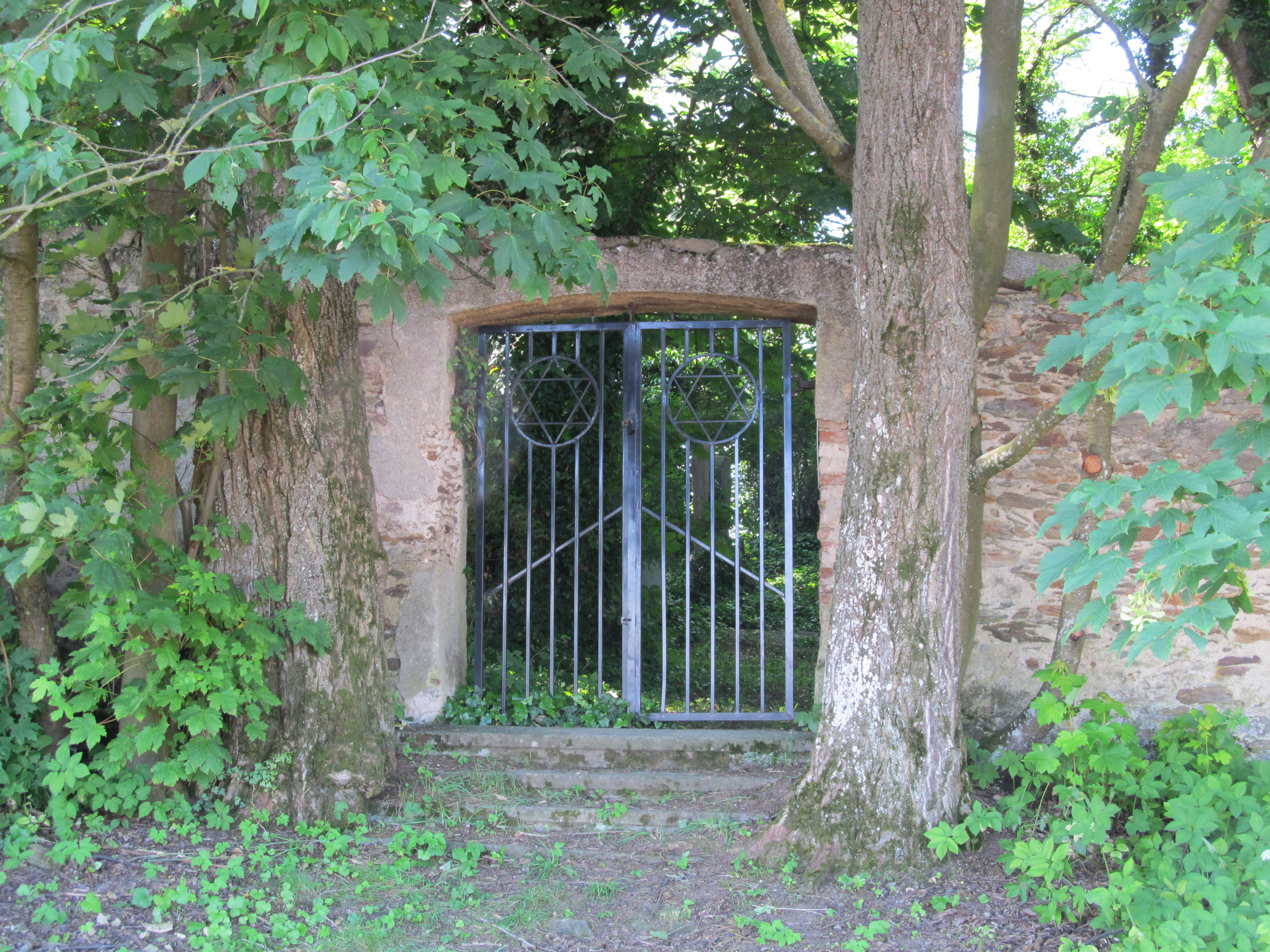 Nýrsko 01 ŽH - vstupní brána